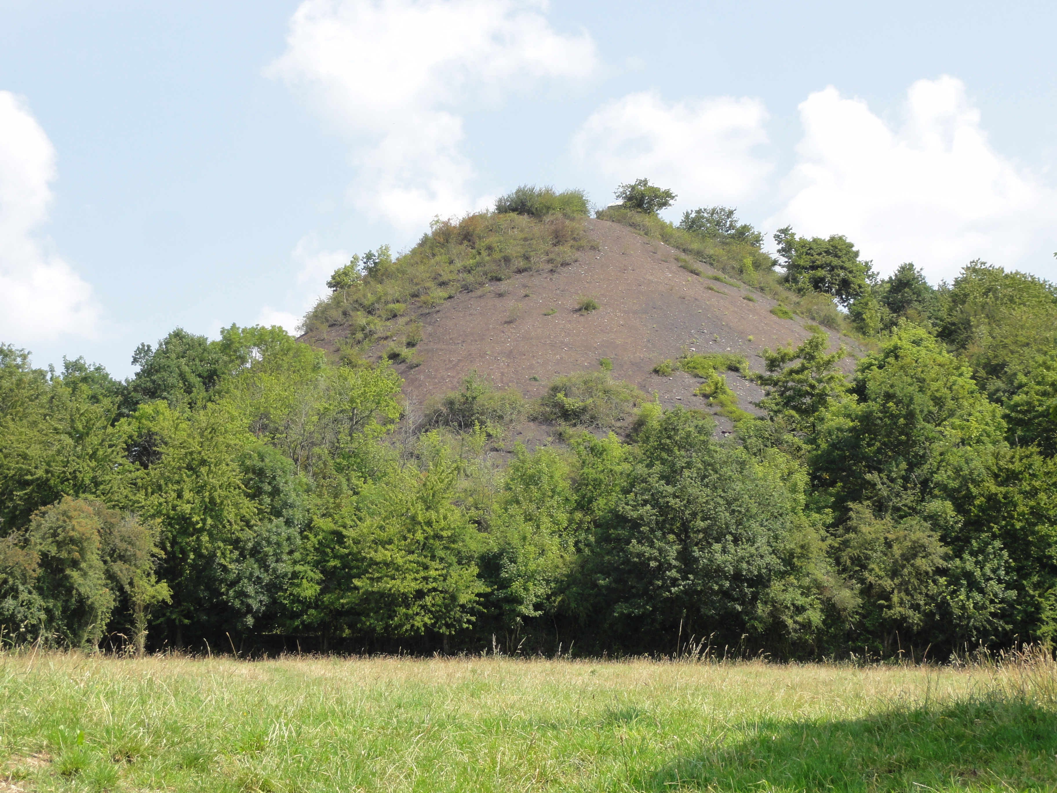 Terril n° 244 dit Fléchinelle Ouest, fosse n° 1 - 1 bis de la Compagnie des mines de Ligny-lès-Aire dans le bassin minier du Nord-Pas-de-Calais, Enquin-les-Mines, Pas-de-Calais, Nord-Pas-de-Calais, France. Le terril no 244 est inscrit sur la liste du patrimoine mondial de l'Unesco le 30 juin 2012 et y constitue le site no 109.